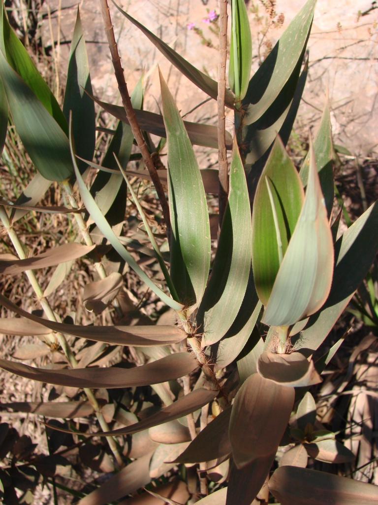 Aulonemia effusa (Hack.) McClure - POACEAE - Serra do Espinhaço - Estrada Real - Diamantina - Minas Gerais - Brasil.